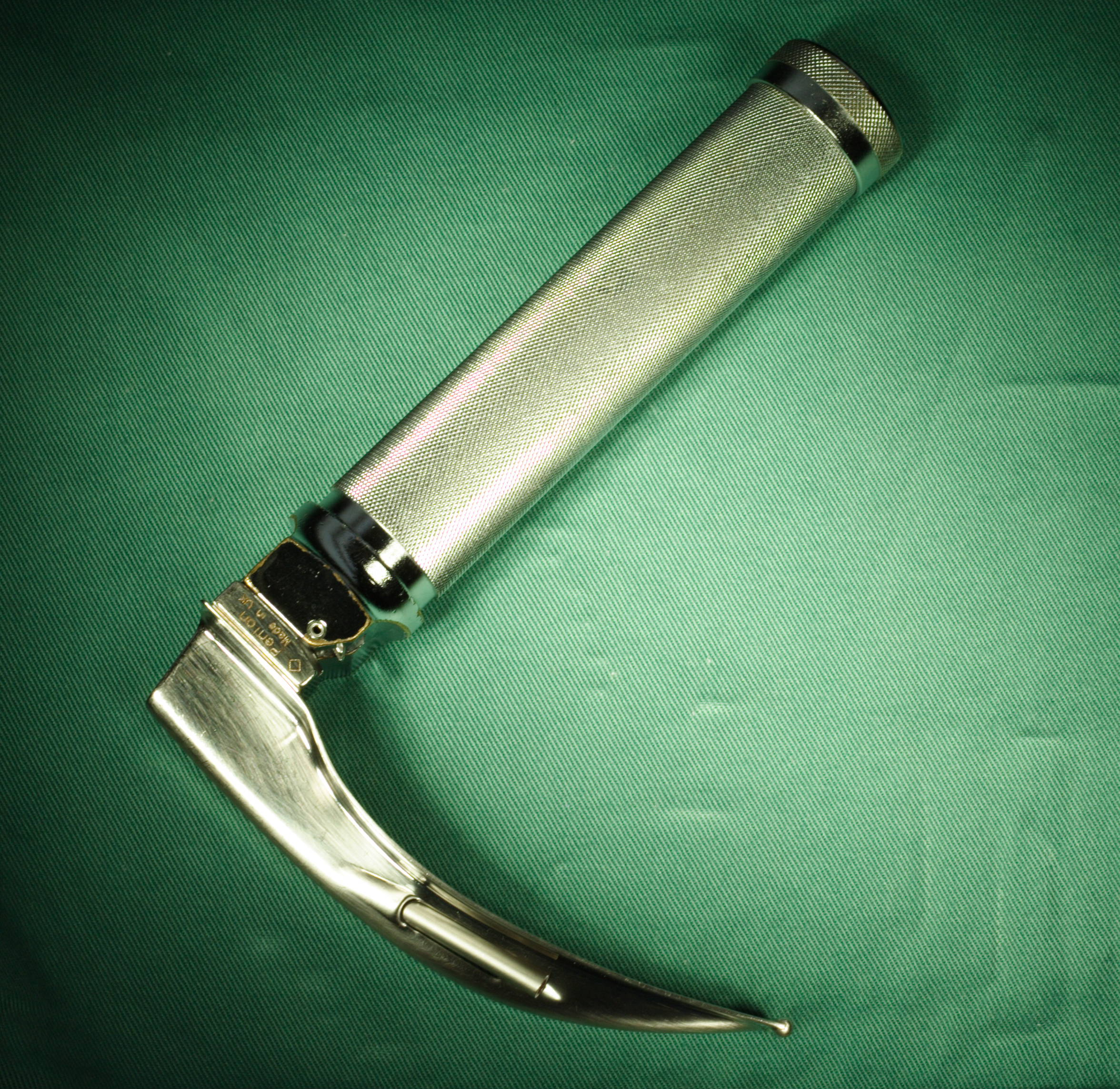 laryngoscope